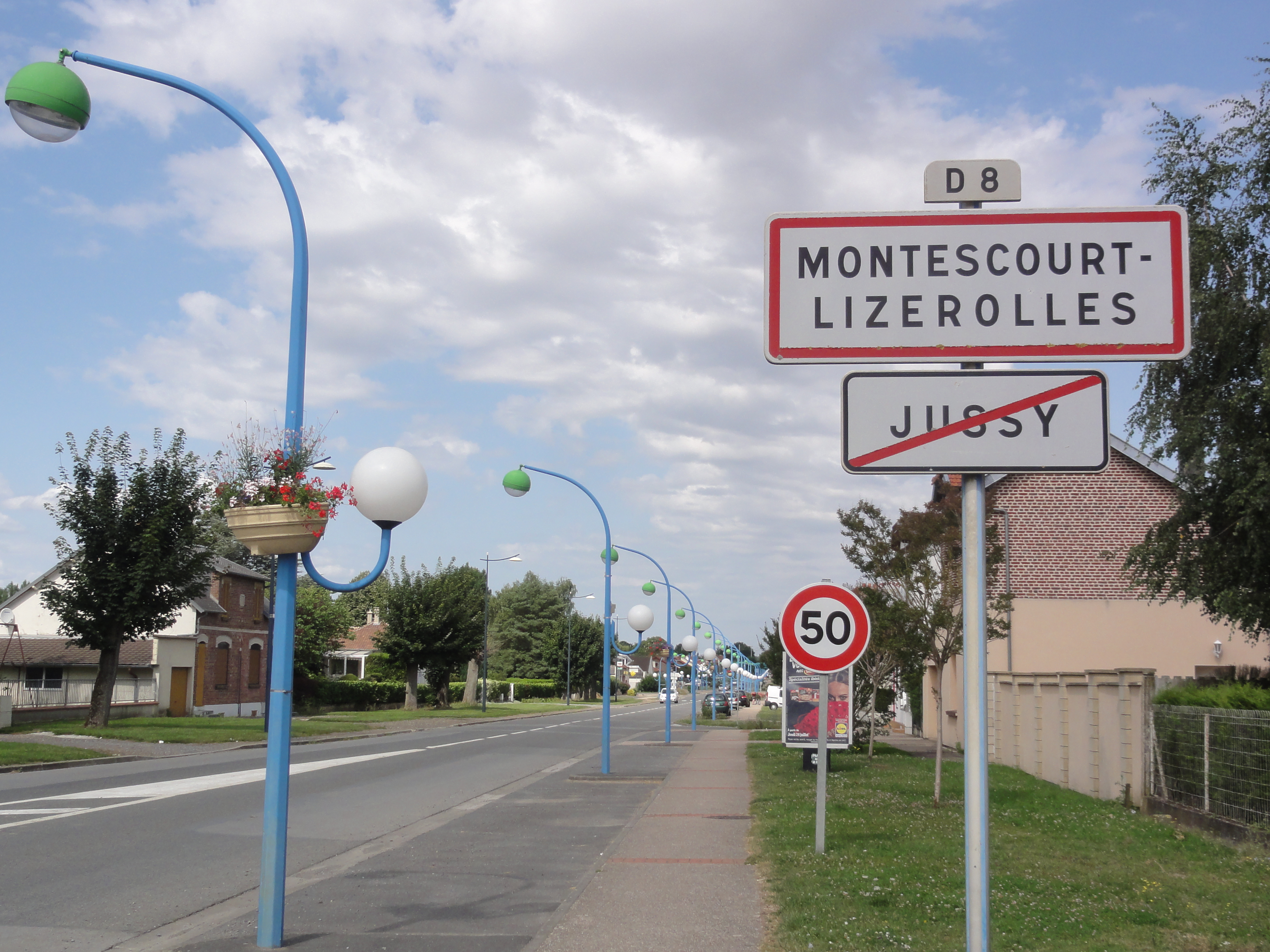 Montescourt-Lizerolles (Aisne) city limit sign, coming from Jussy